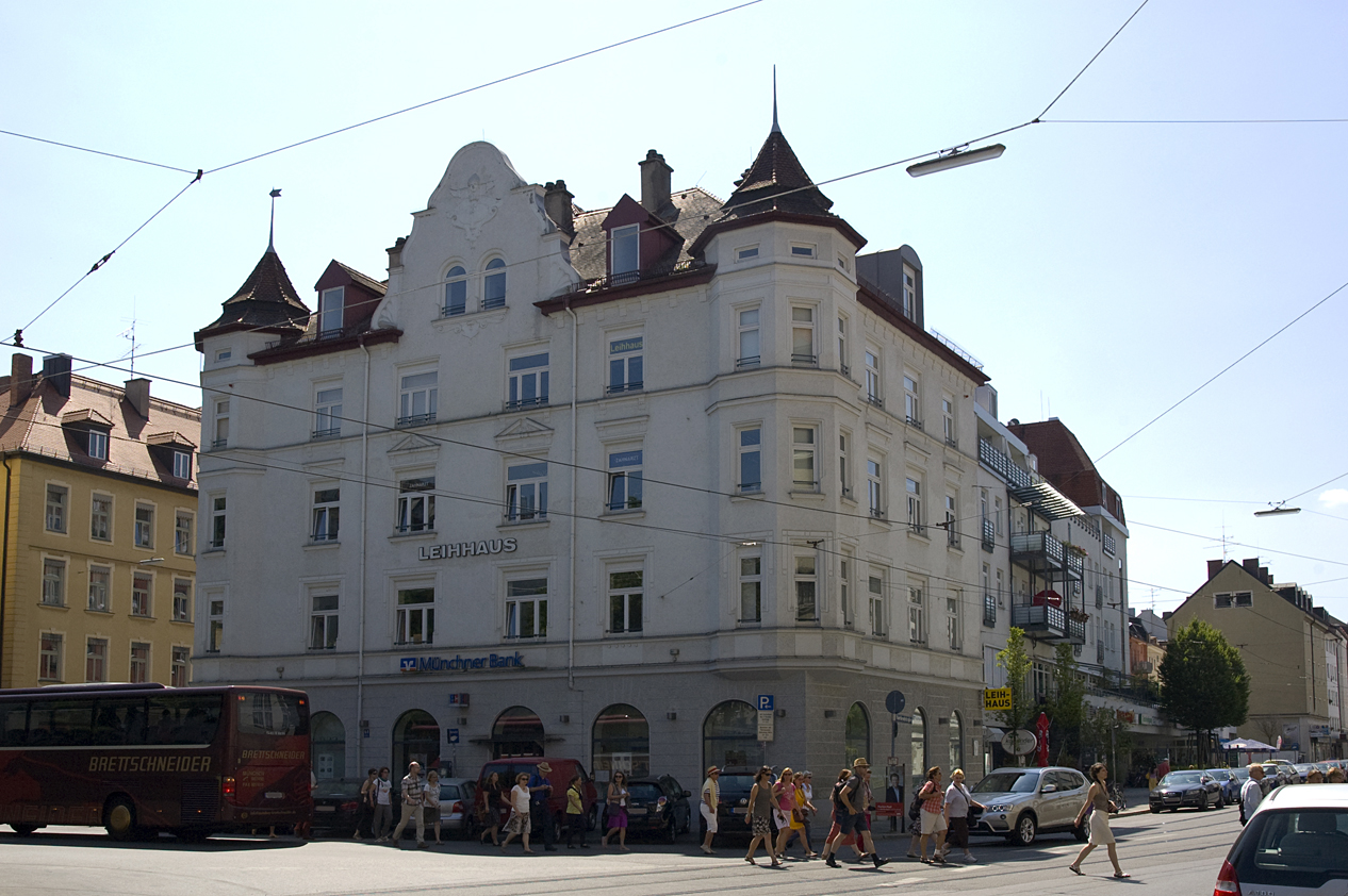 Nordendstraße 64, Mietshaus, neubarock, mit zwei Erkertürmchen an den Ecken und Stuckdekor am Giebel, 1909 von Paul Breitsameter; südlicher Abschluss des Kurfürstenplatzes.